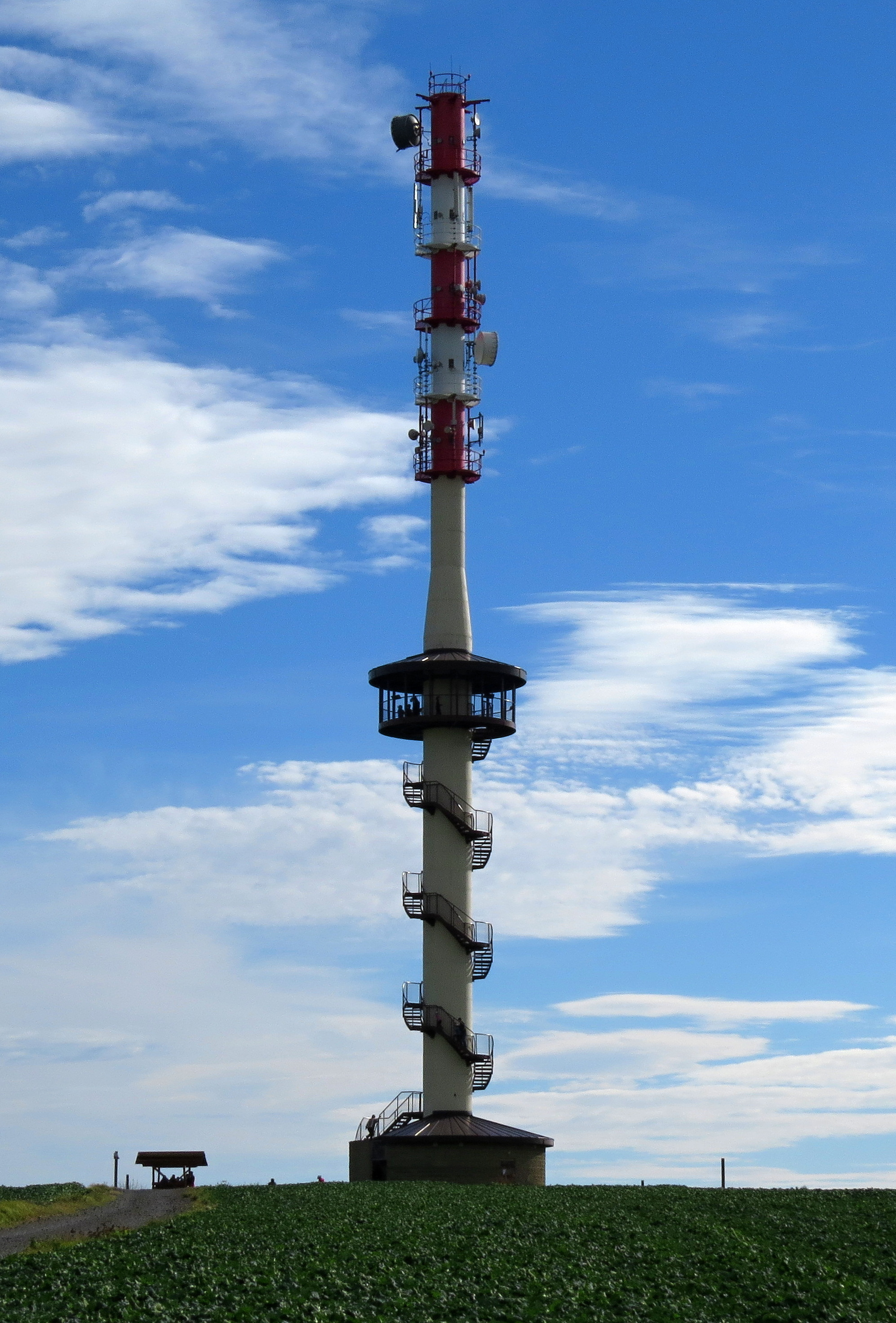 Rozhledna Bílov (Kanihůra)